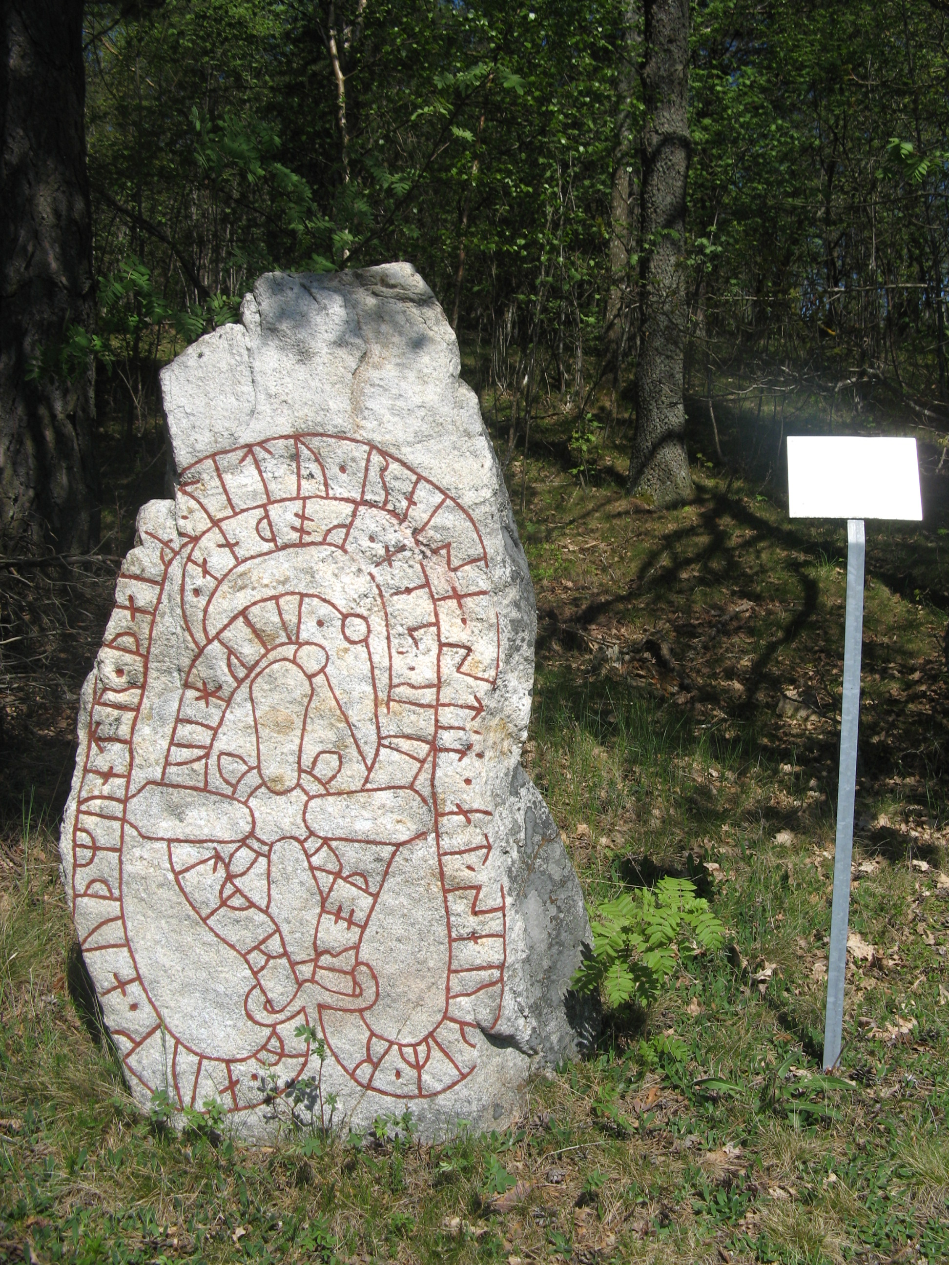 Överselö 110:2. (Sö 209). Runristning. Fast fornlämning.